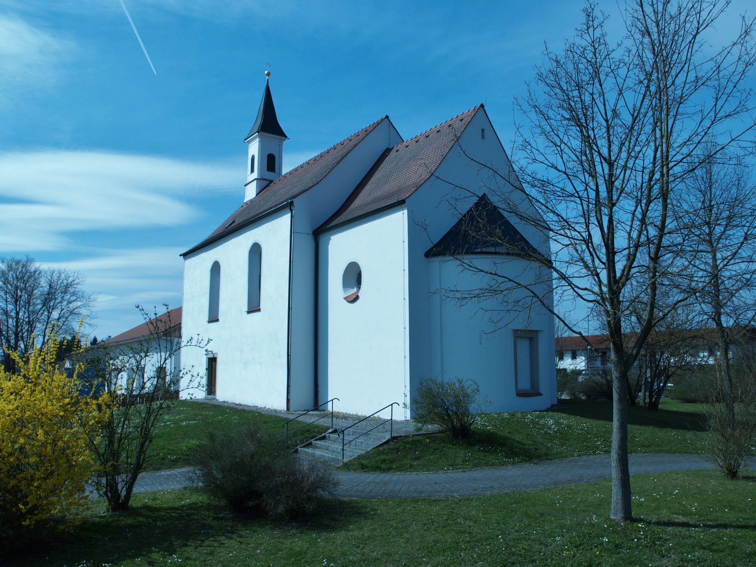 Die Filialkirche Sankt Jakobus in Unterzeitldorn